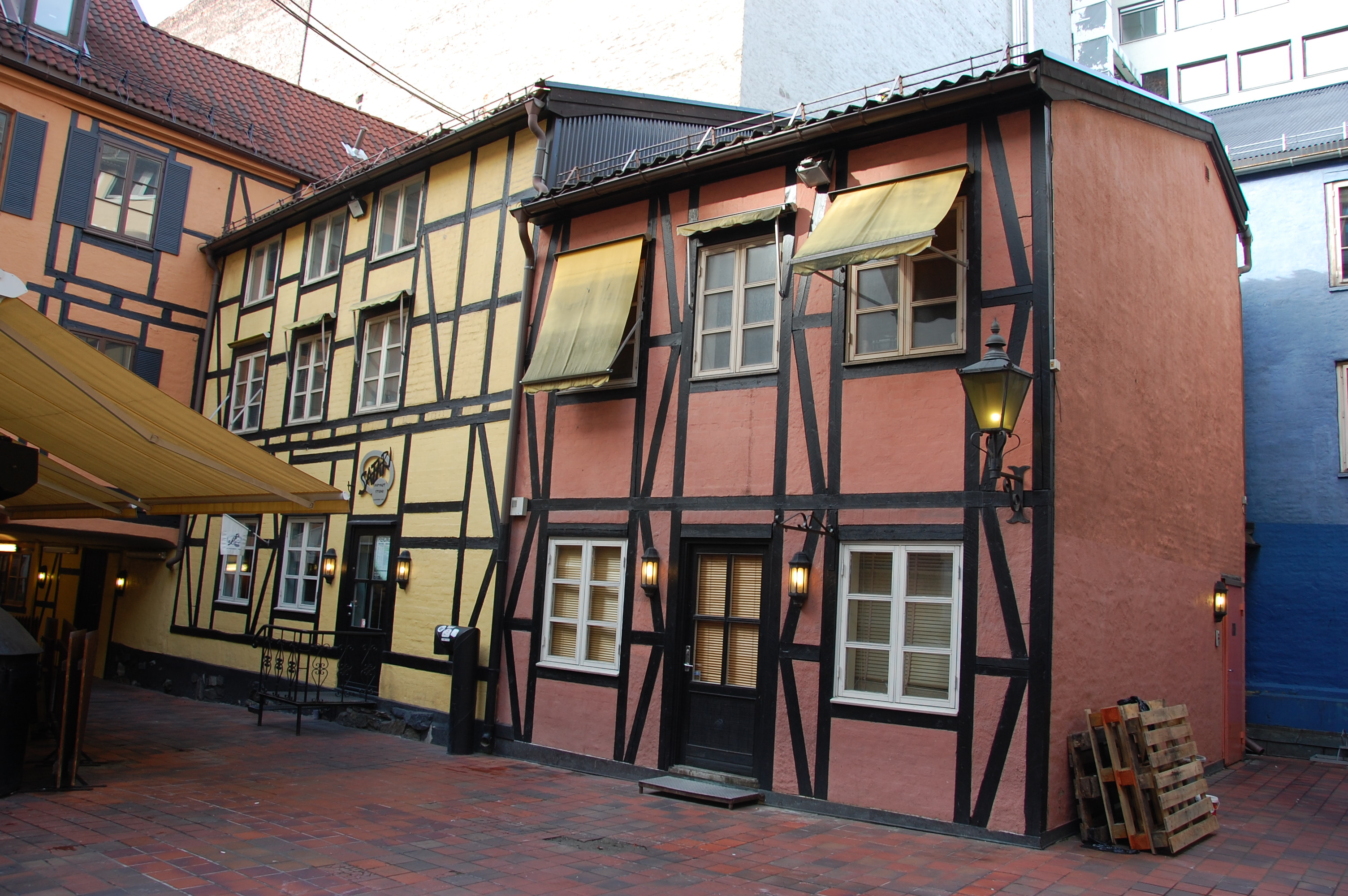 Grensen 9, indre gårdsrom.